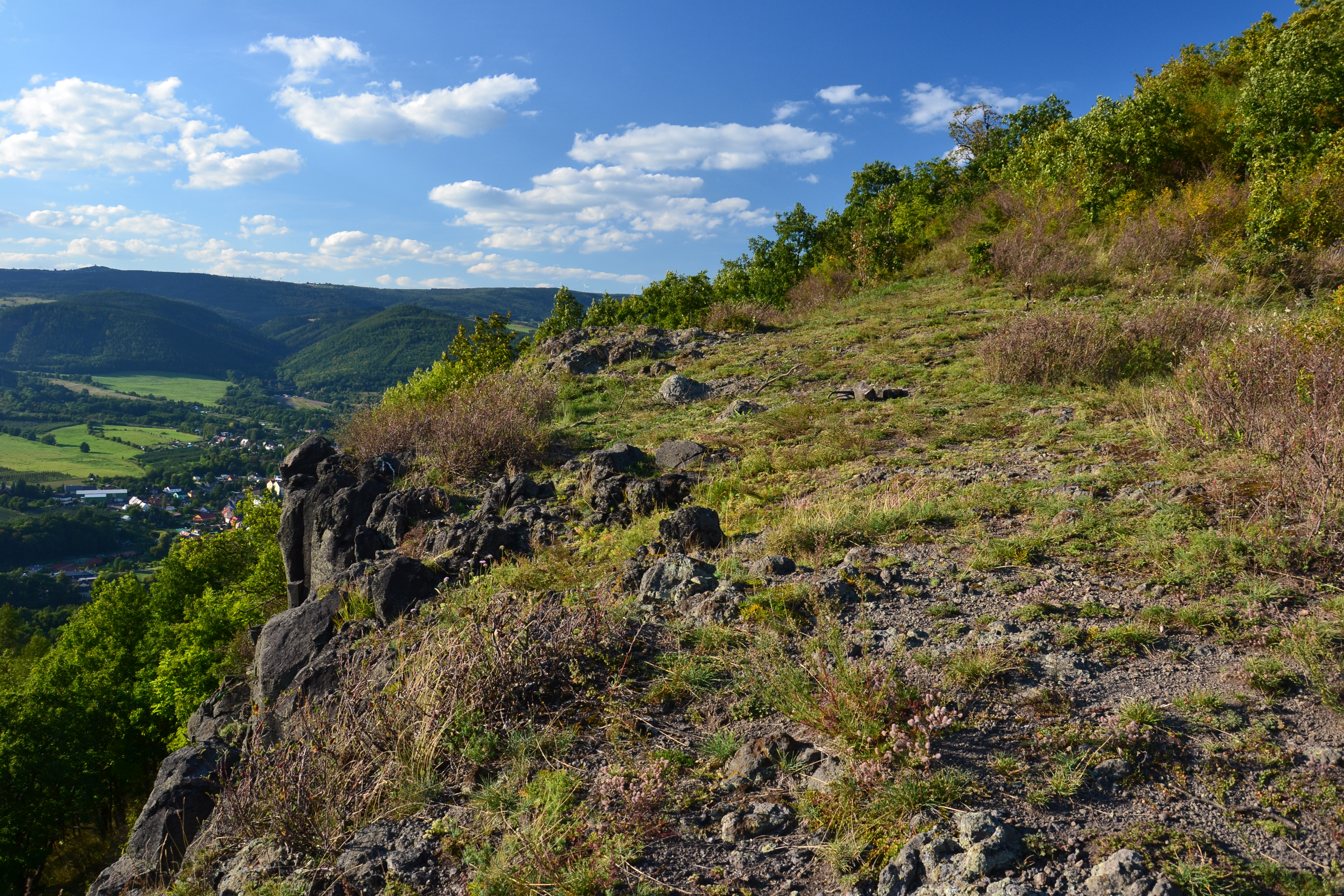 Vrcholová plošina na skále v PP Mravenčák